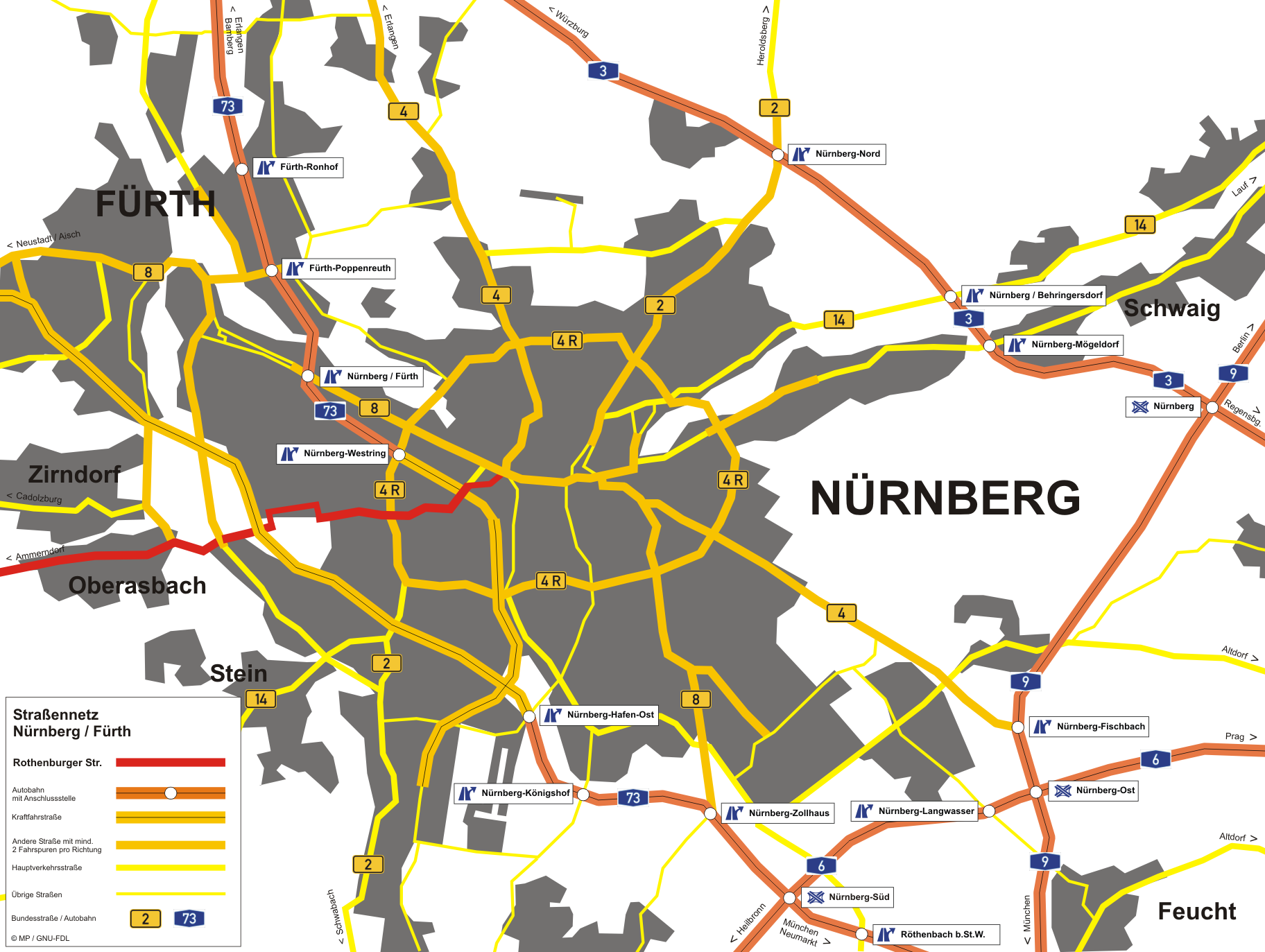 Straßennetz Nürnberg: Rothenburger Straße